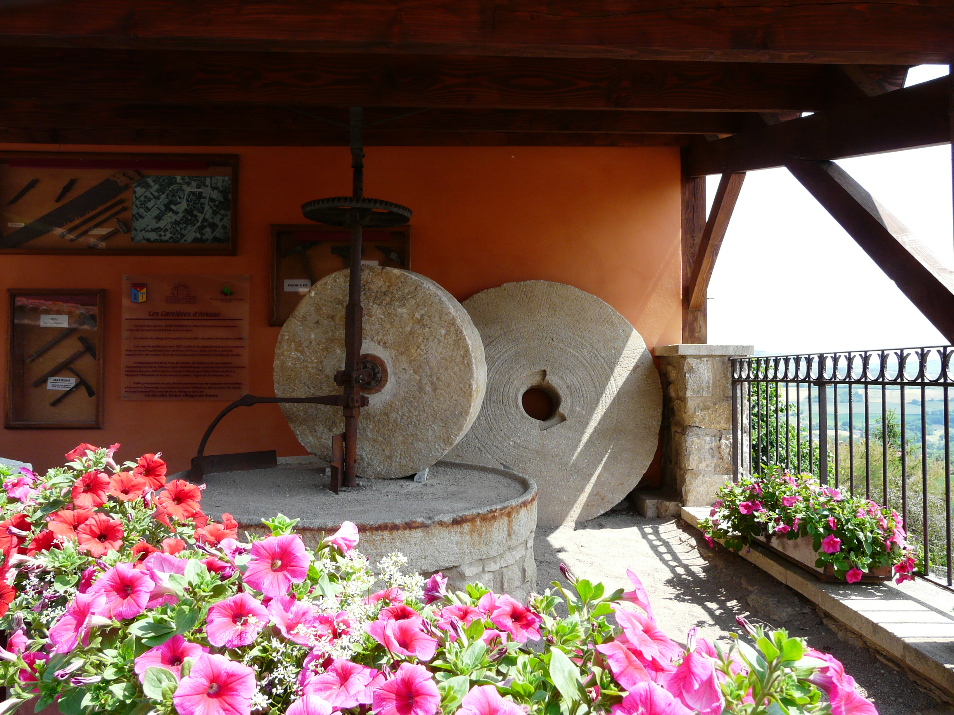 Meules en arkose, dans le village de Montpeyroux, Puy-de-Dôme, France.